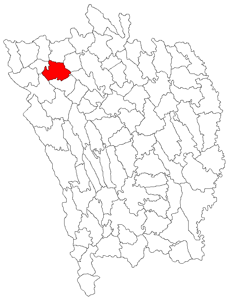 Categorie:Hărţi ale judeţului Vaslui